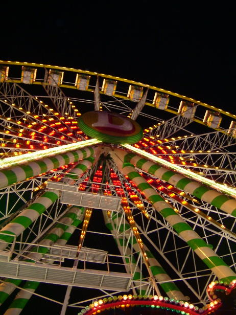 D'Riserad vun der Schueberfouer bäi Nuecht. Am Joer 1340 gouf si vum Jang de Blannen haaptsächlech als Véimoart agefouert.